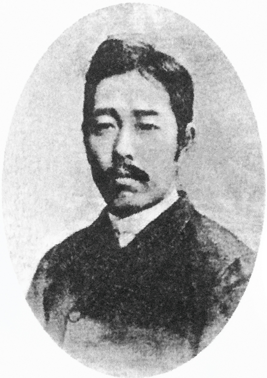 大久保忠順の肖像写真。